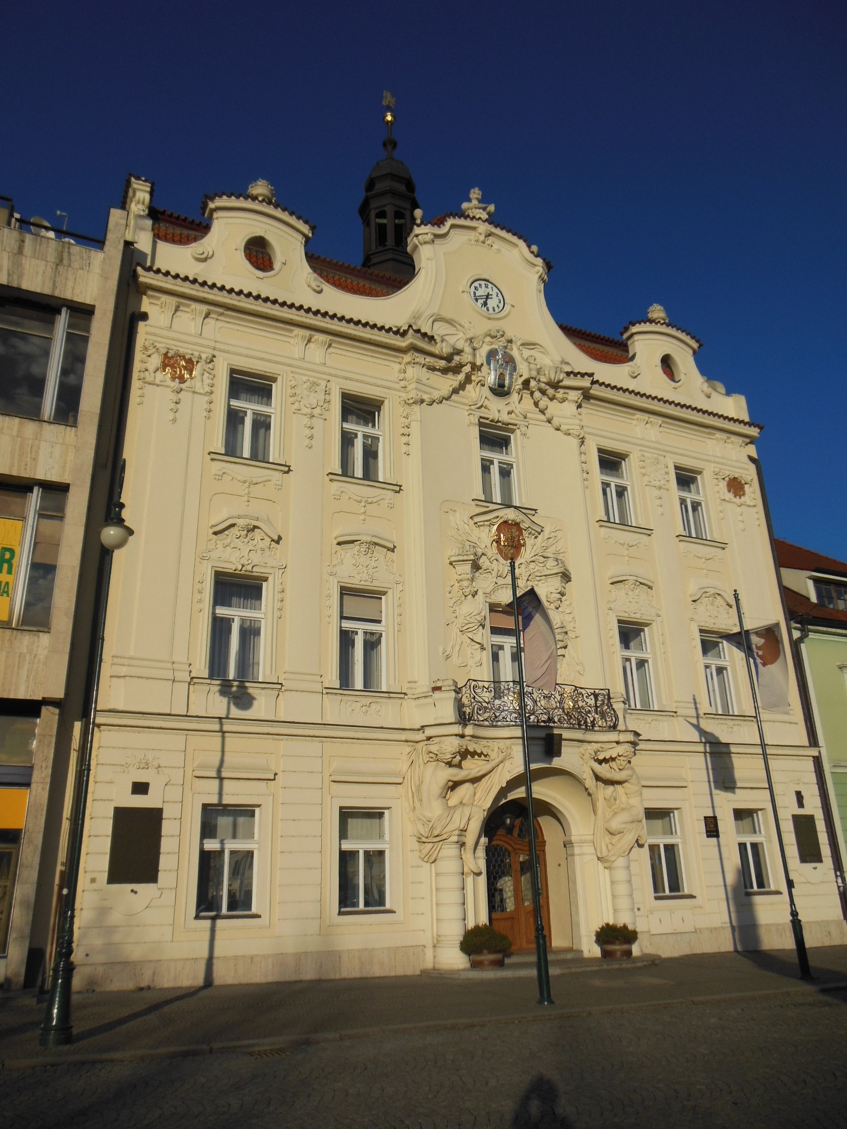 Městská radnice na Husově náměstí v Berouně.